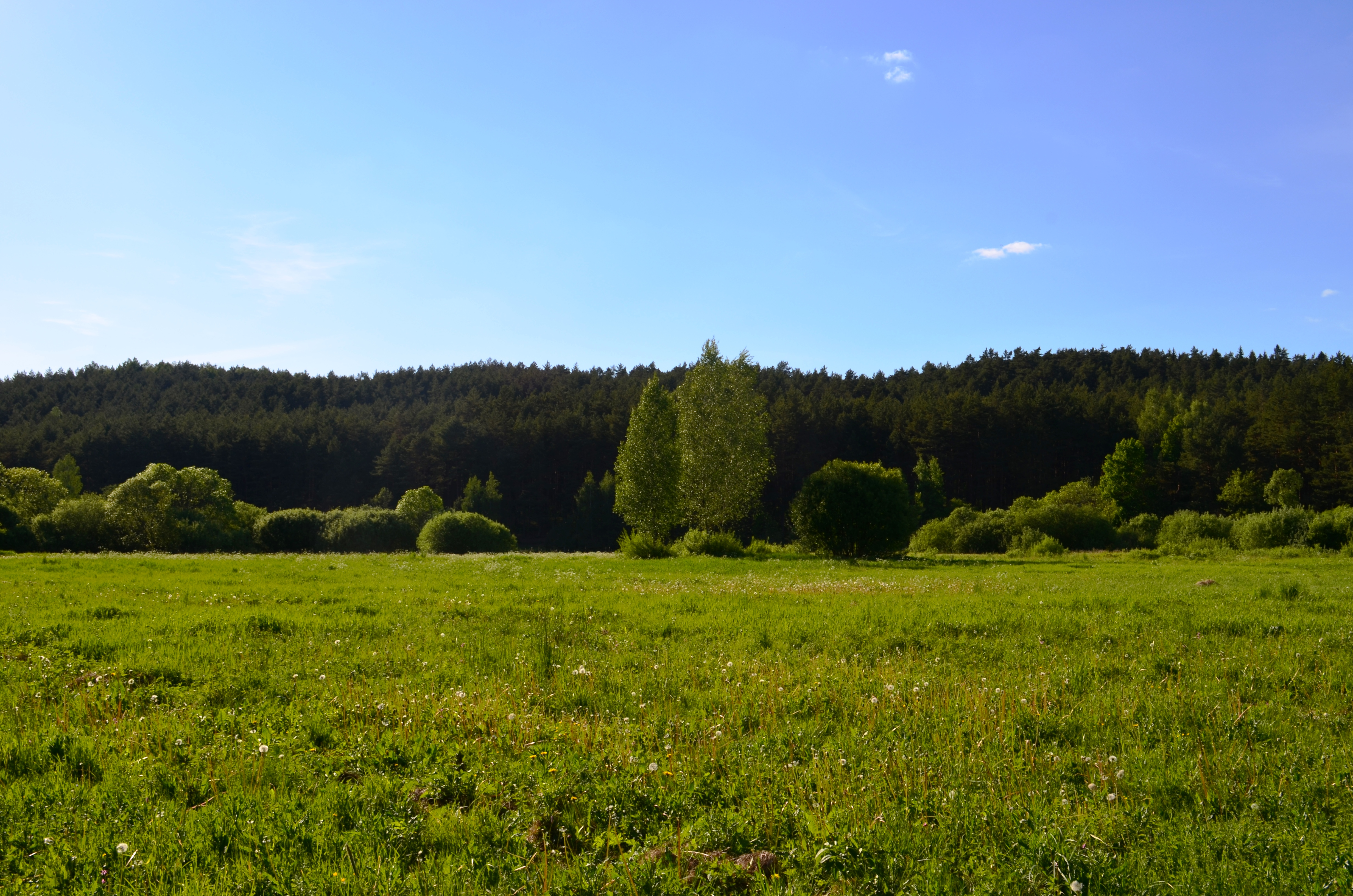 Dvarčionių pieva, Vilnius